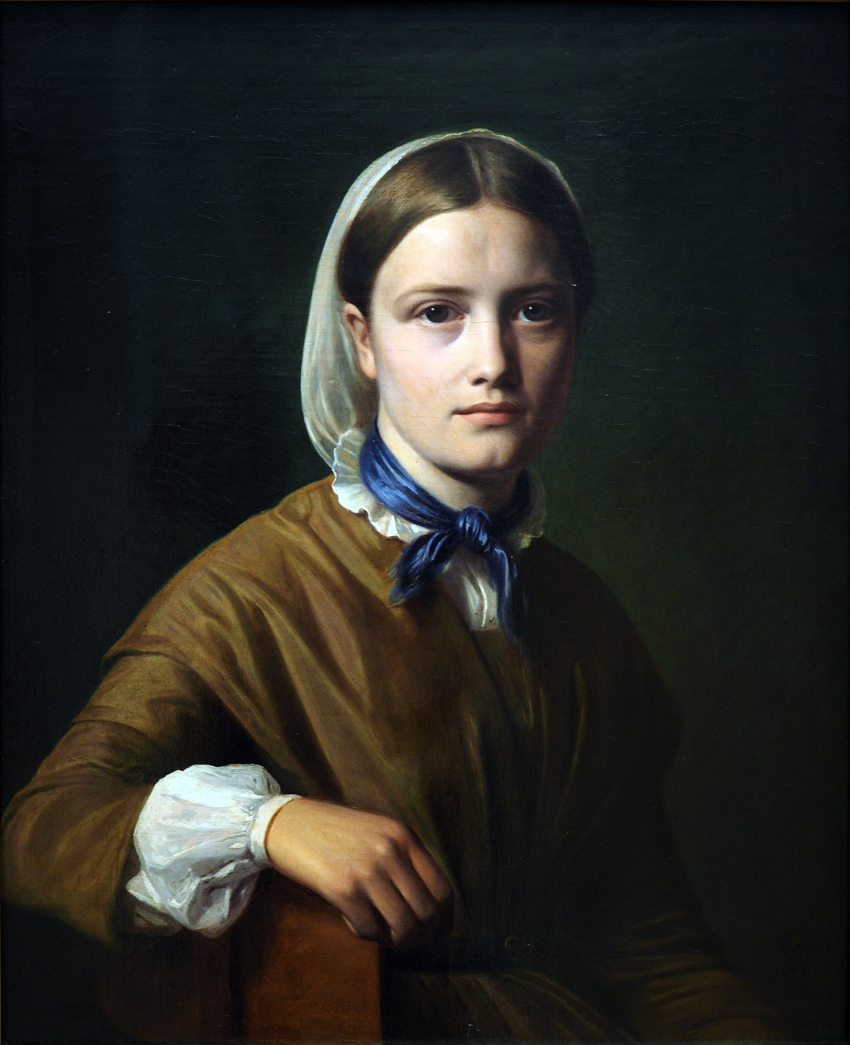 Das Bild zeigt eine Schwester der Malers Christen Købke